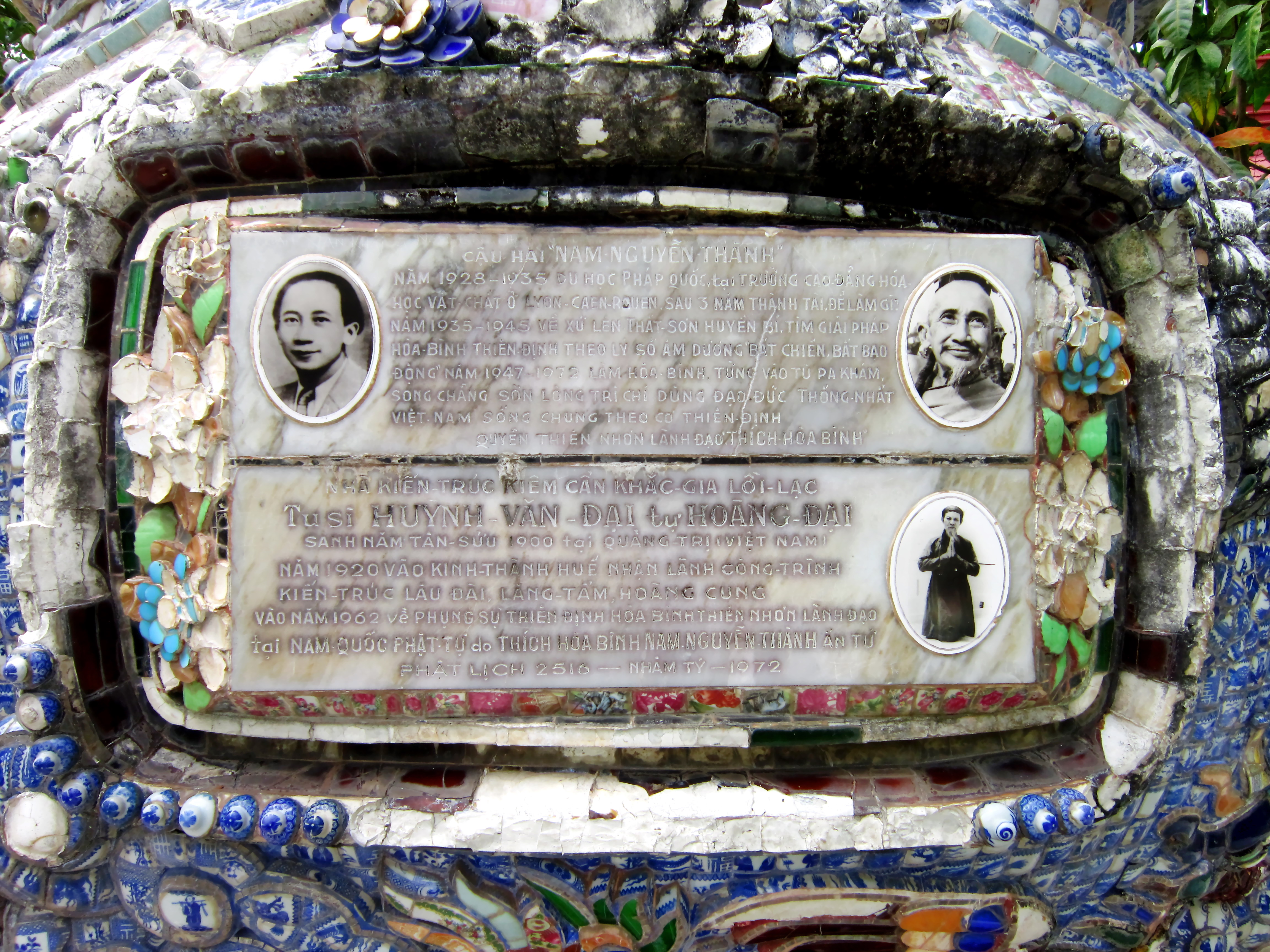 Tấm đá cẩm thạch có ghi vắn tắt lai lịch ông Đạo Dừa (Nguyễn Thành Nam, 1909-1990) và người giúp ông xây dựng nơi hành đạo trên cồn Phụng, Bến Tre, Việt Nam. Bia được gắn trên đỉnh lớn, và hiện vẫn còn ở nơi vừa kể.